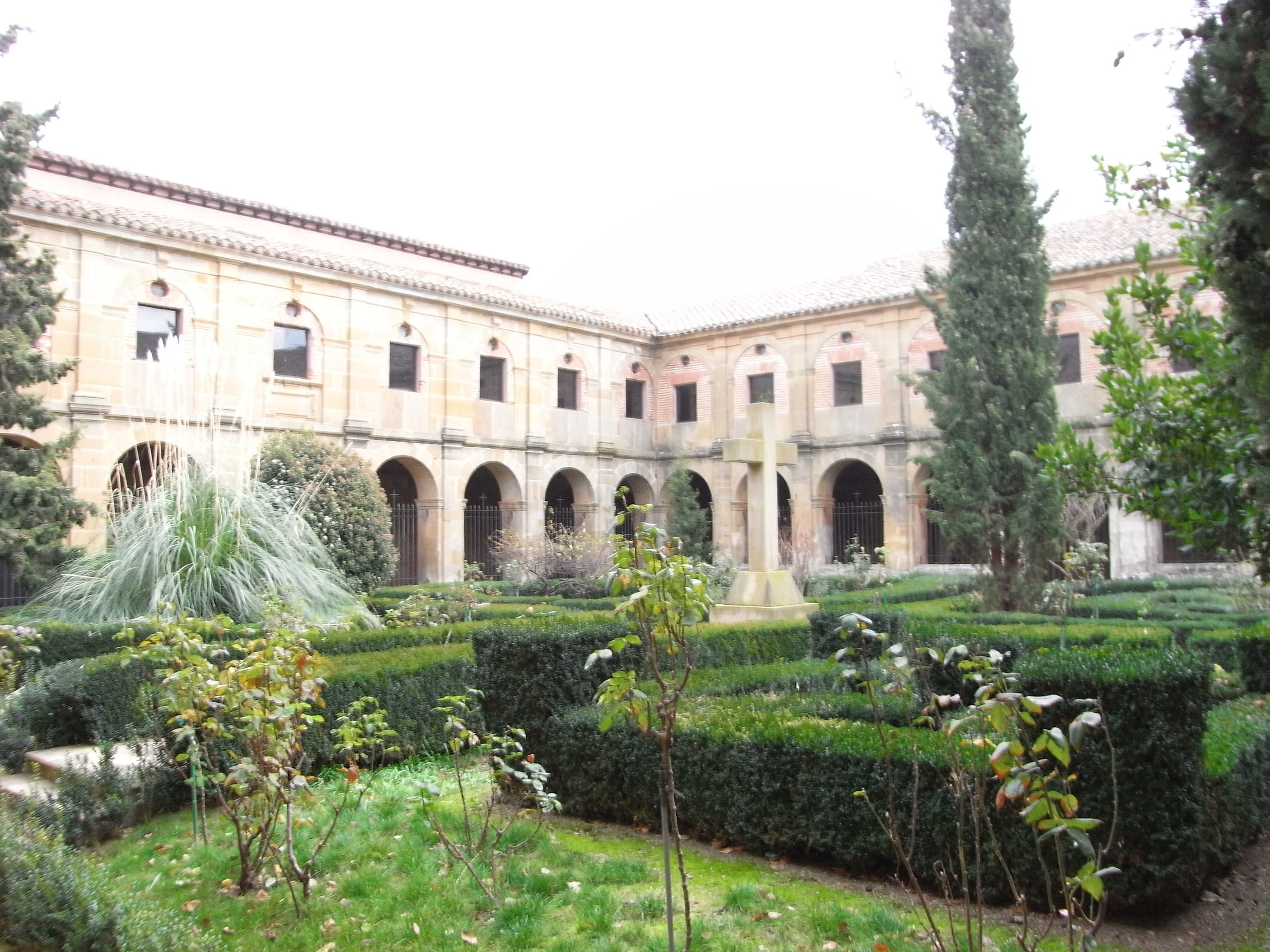 Claustro del Monasterio de Cañas